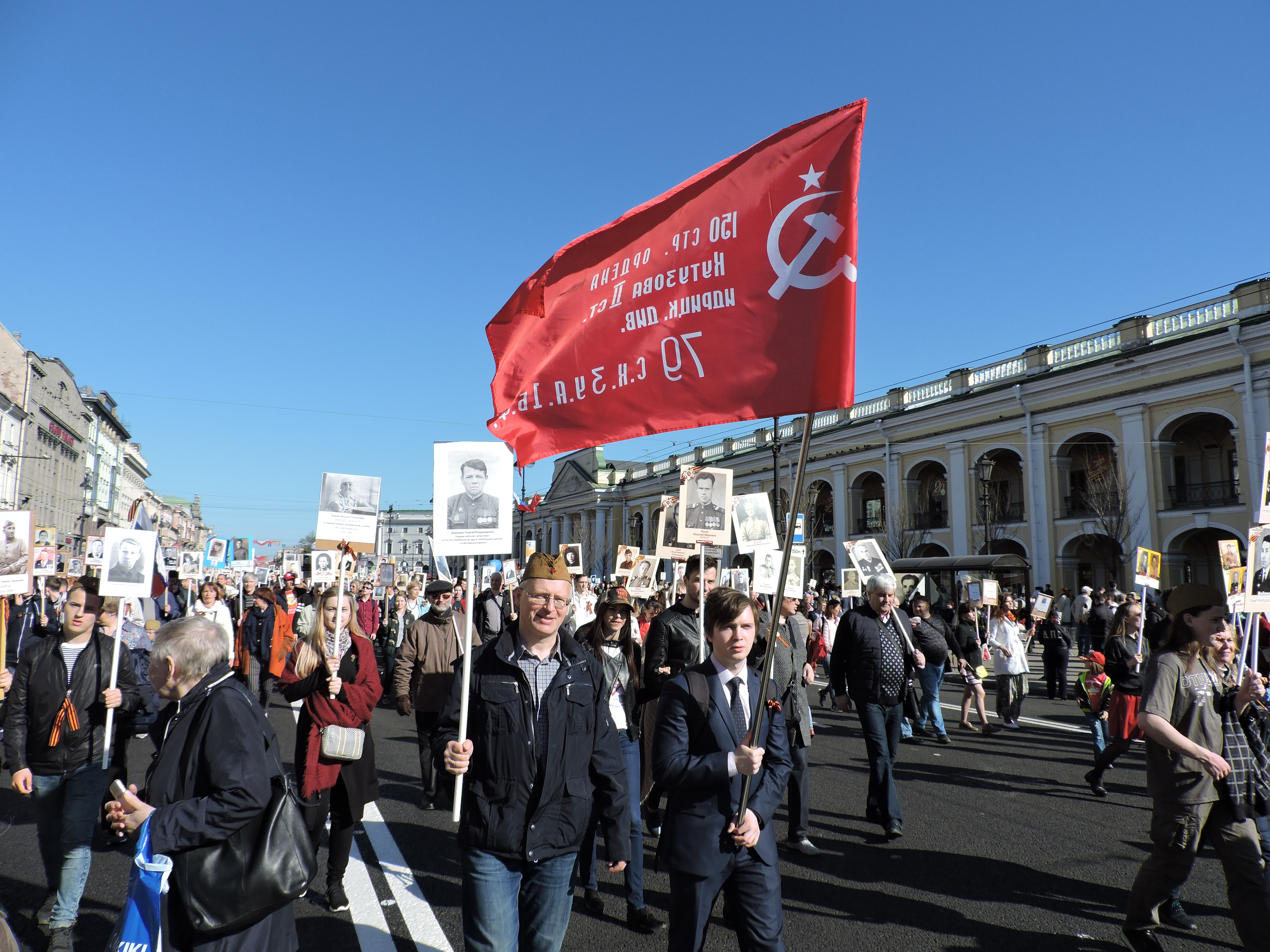 Шествие Бессмертного полка, СПб, 9 мая 2018